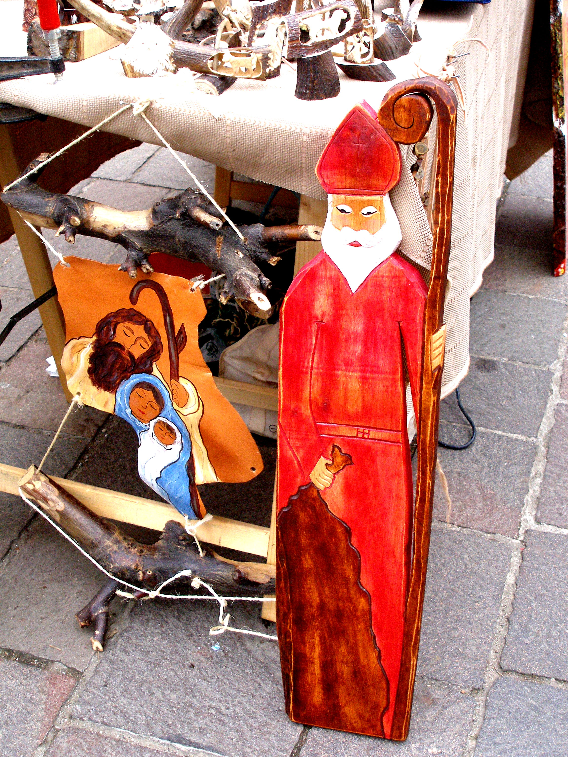 Predvianočné trhy 2009 v meste Prešov.Na dreve maľovaný svätý Mikuláš a Svätá rodina